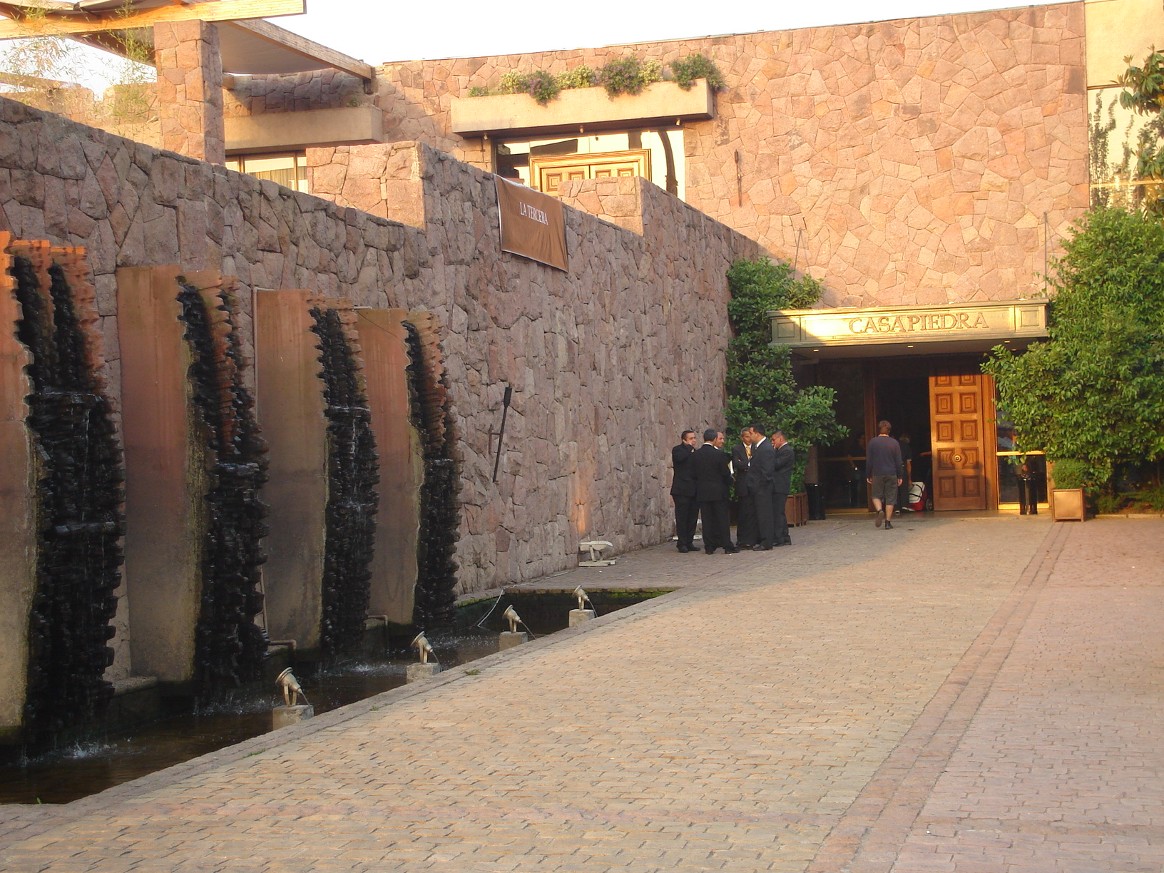 Entrada principal de CasaPiedra.